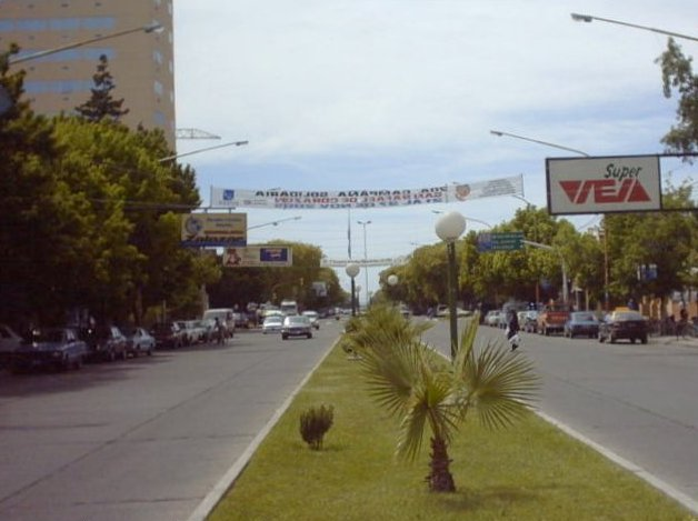 Vista diurna de calle Hipólito Yrigoyen al 900 en San Rafael Mendoza Argentina; autor: J. Alejandro Noli (janoli) Fecha de la toma: 24/11/2005 11:30 hs. Cámara digital concord 2.0 Mpx